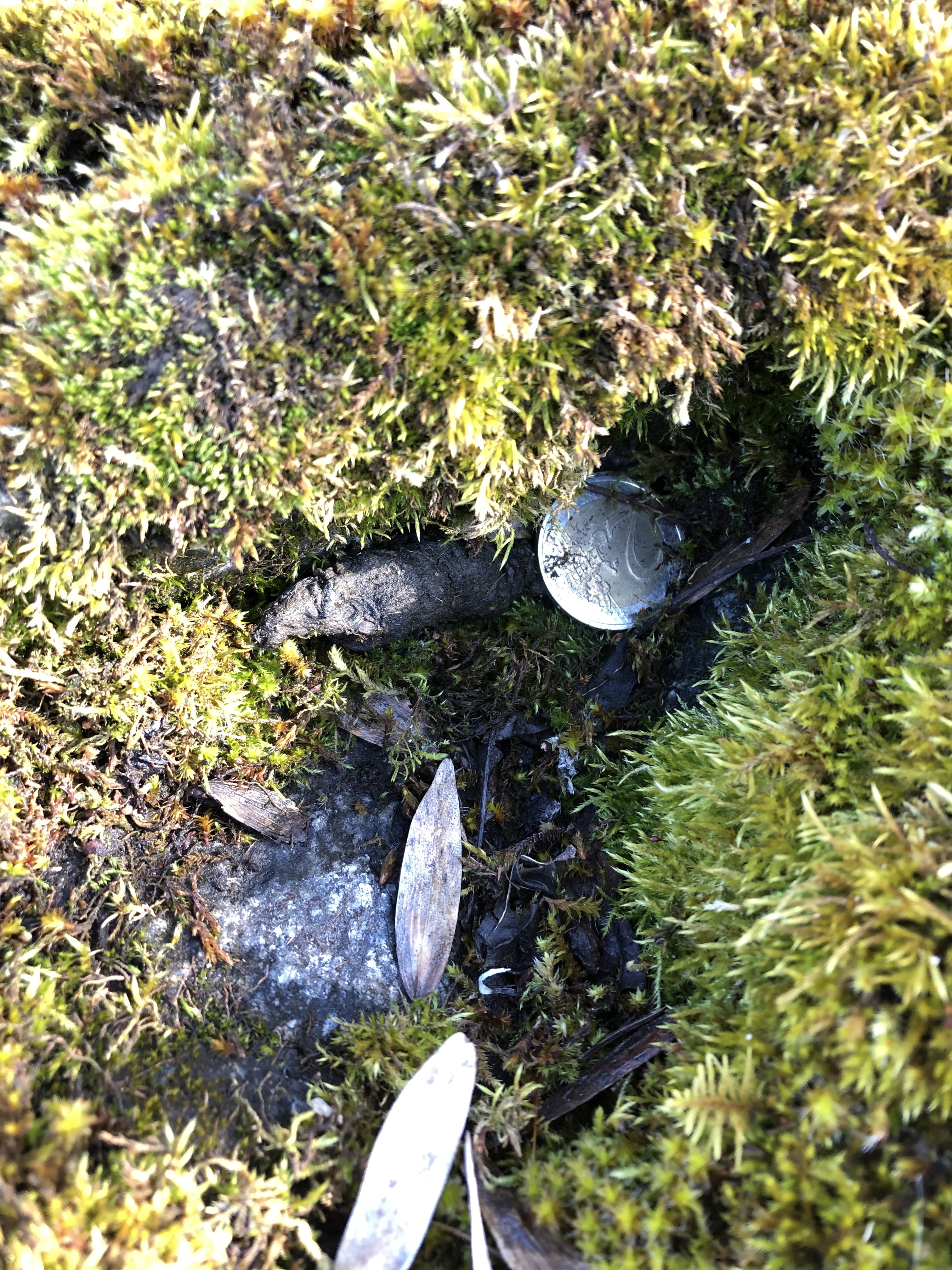 Lohukivis 2-eurone